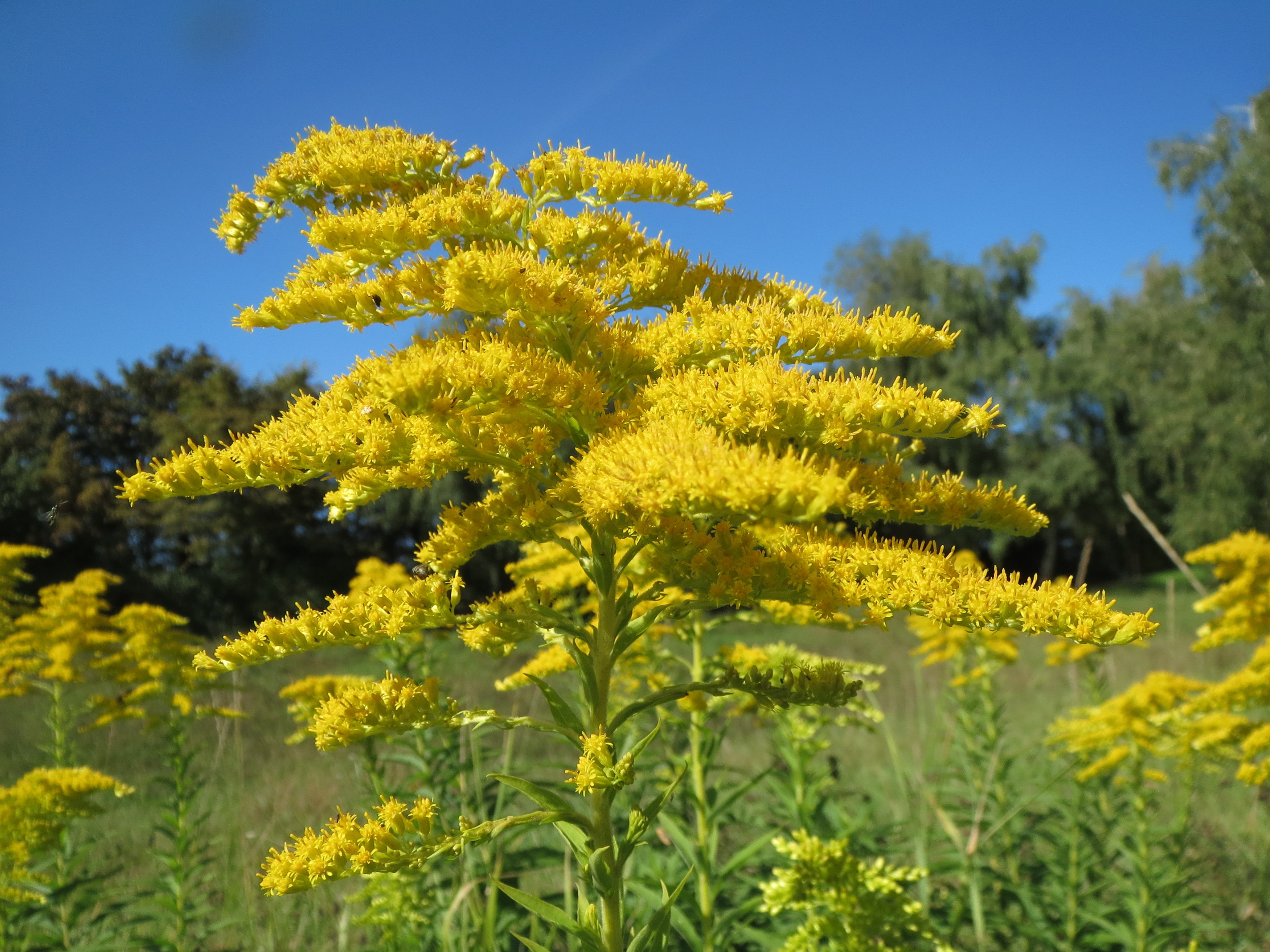 Kanadische Goldrute (Solidago canadensis) im Hockenheimer Rheinbogen